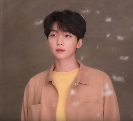 씬플레이빌 4월호를 장식한 뮤지컬 '그리스'의 정세운 대니! 처음 뮤지컬에 도전하는 그를 응원하며 화보 촬영 현장을 공개합니다.